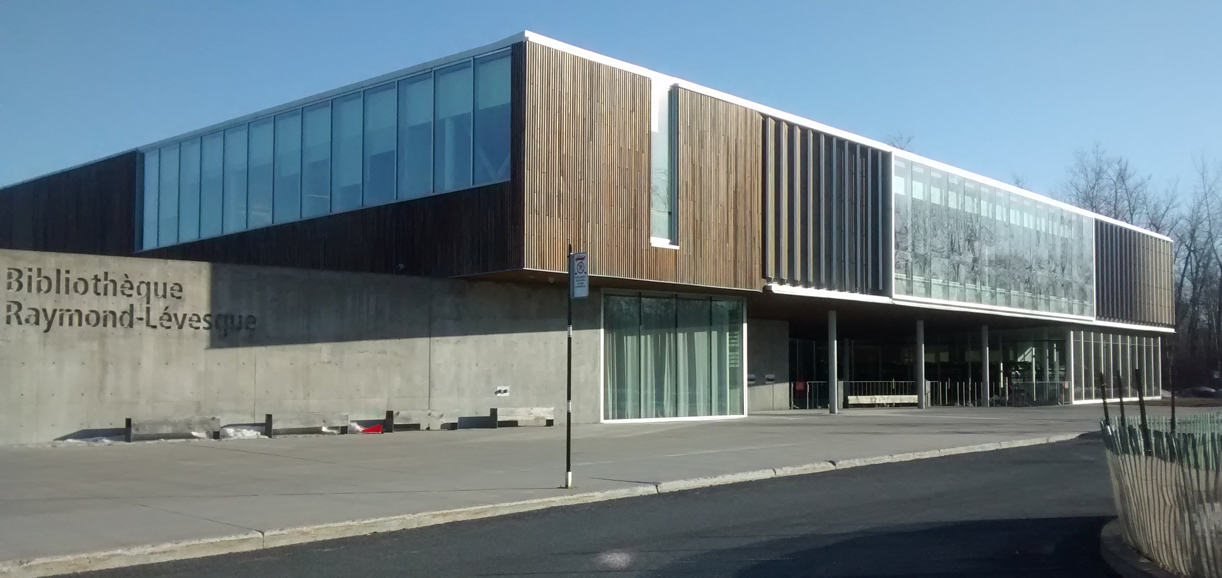 Bibliothèque Raymond-Lévesque de Saint-Hubert, agglomération de la ville de Longueuil, vue du boulevard Cousineau - route 112.